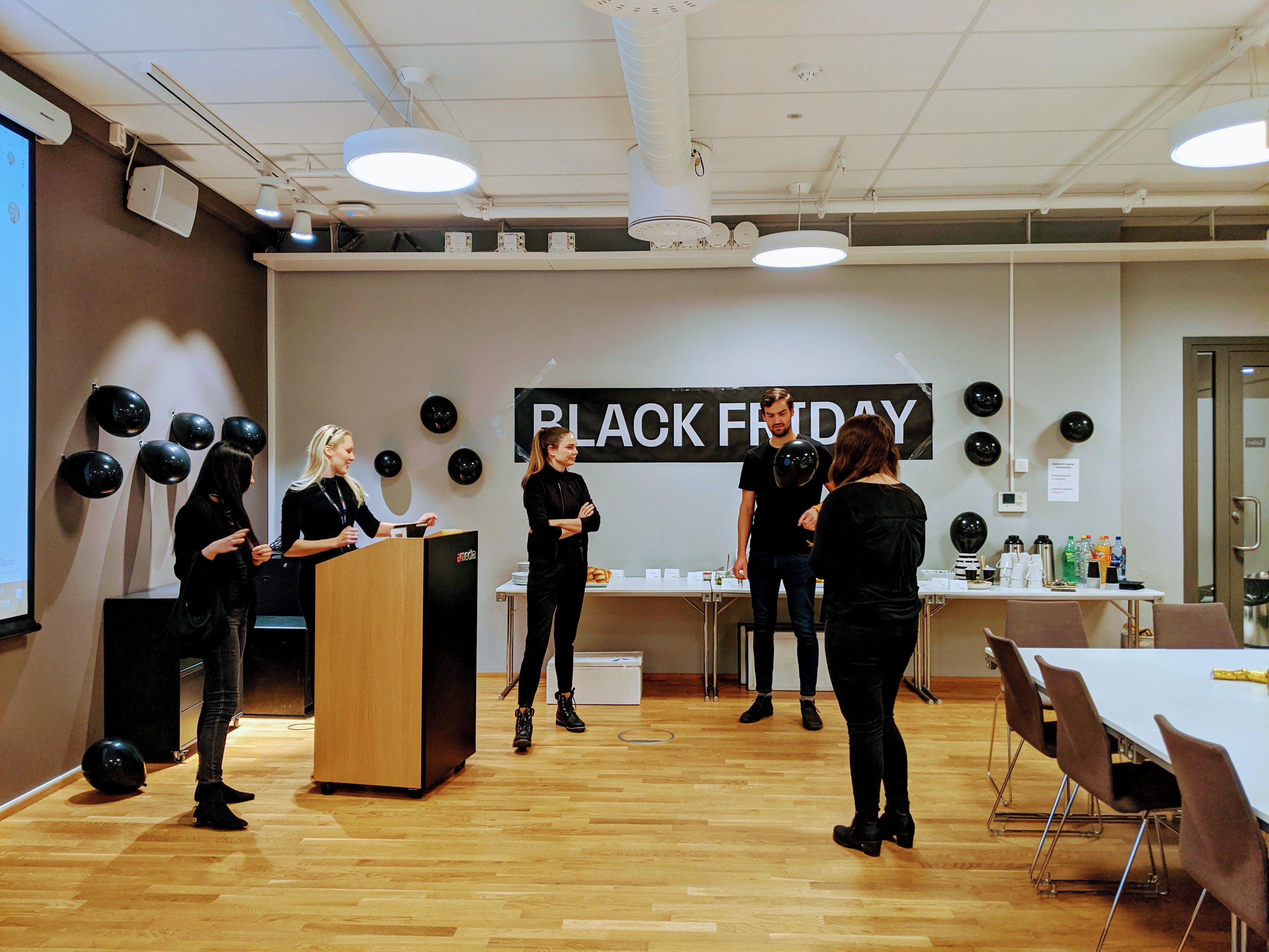 Bilde tatt fra planlegging av black friday i Nettavisen 2019